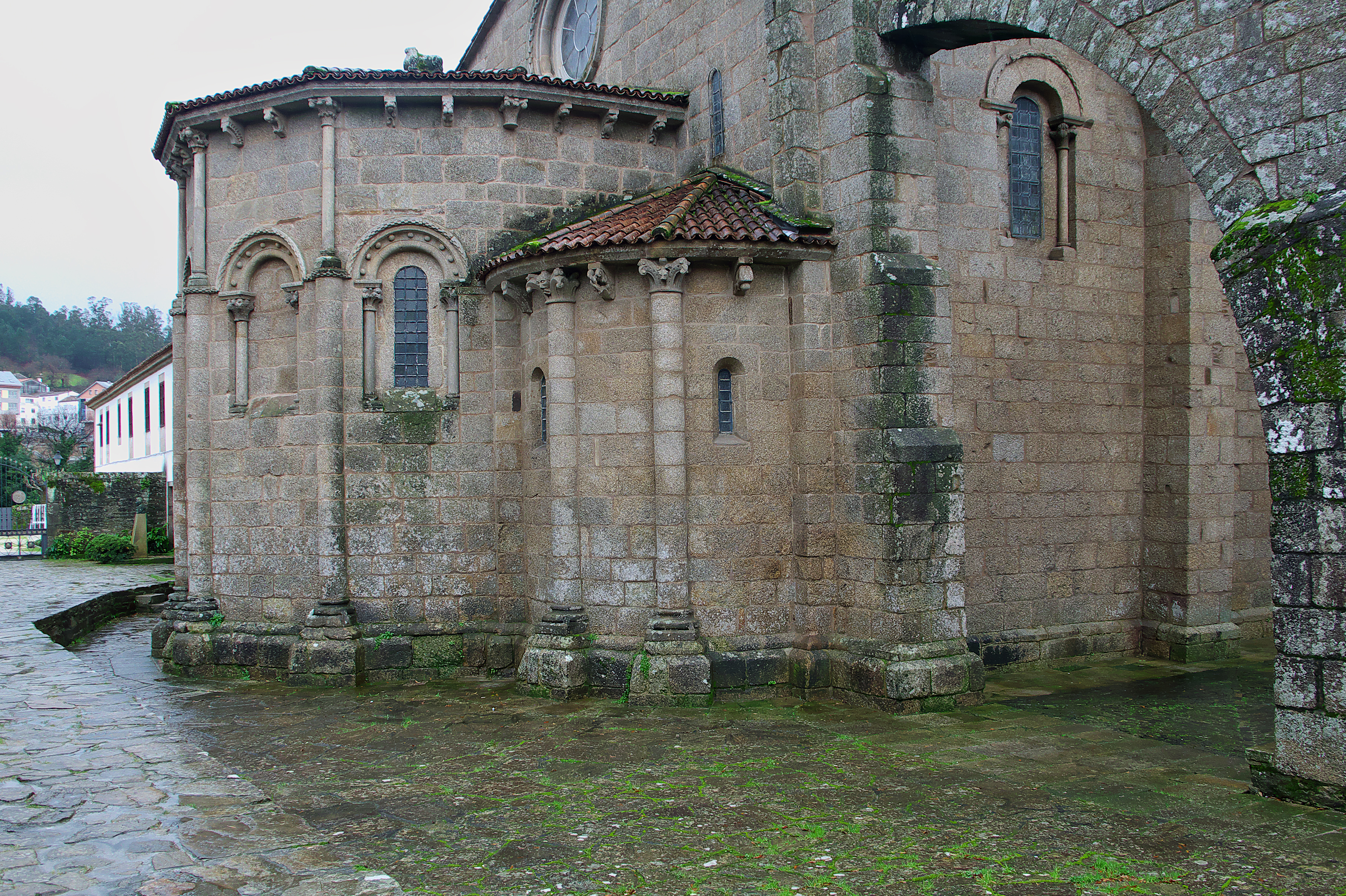 Cabecera de la iglesia monacal (s. XII).